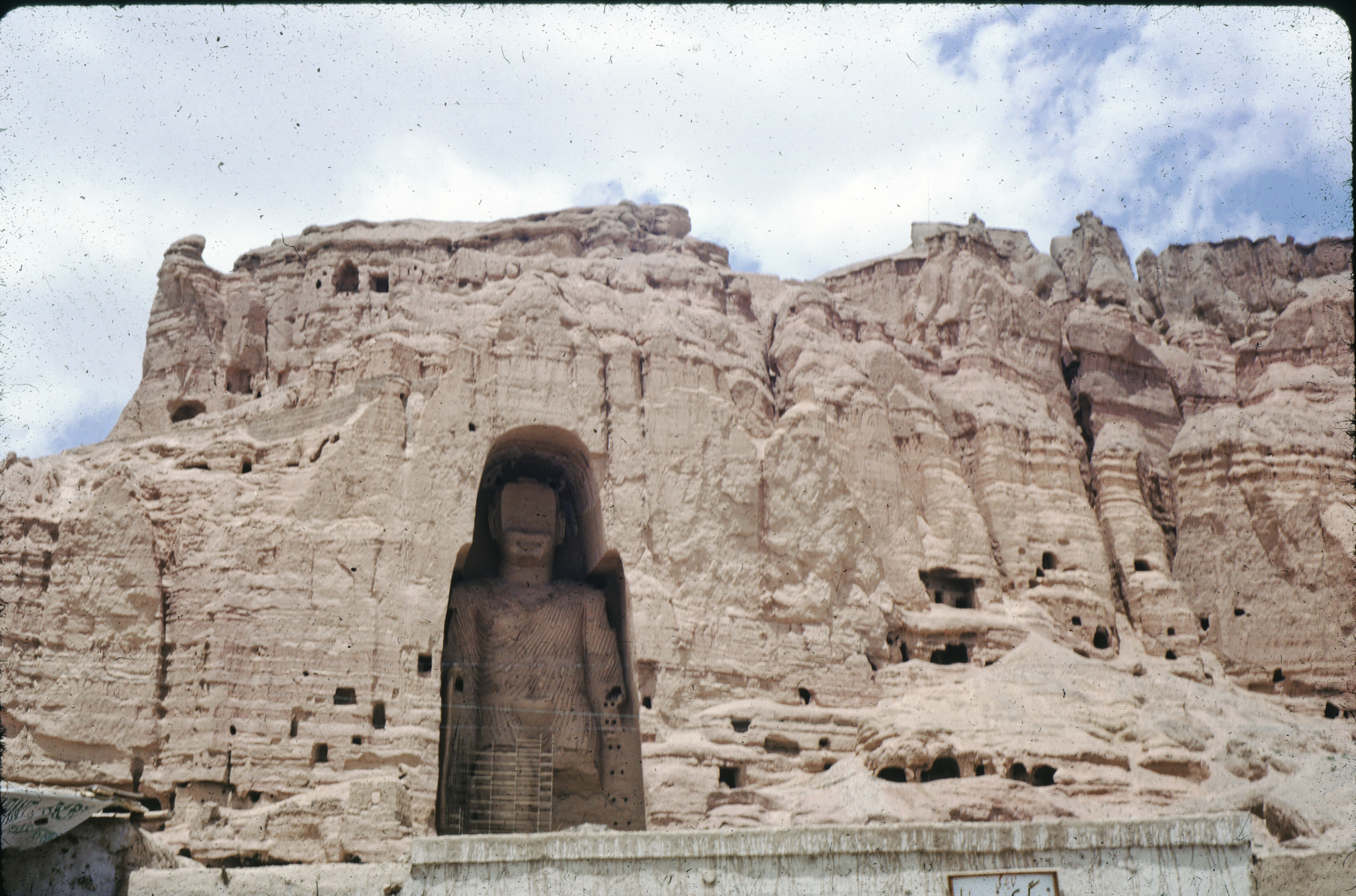 L'Afghanistan photographiée par Françoise Foliot.